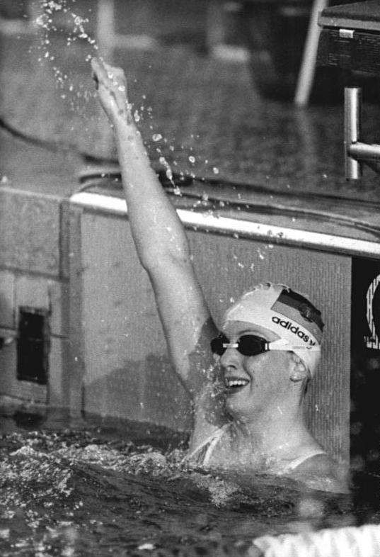 Heike Friedrich ADN-ZB.Settnik-18.6.86 Berlin: 37. DDR-Meisterschaften im Schwimmen- Weltrekord- Jubel bei Heike Friedrich über ihren neuen Weltrekord in 1:57,55 min über 200 m Freistil. Die Karl-Marx-Städterin verbesserte die alte Bestmarke von Kristin Otto (DDR) um genau zwei Zehntelsekunden.